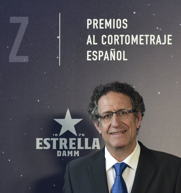 Juan Carlos Casimiro en los Premios Fugaz 2019